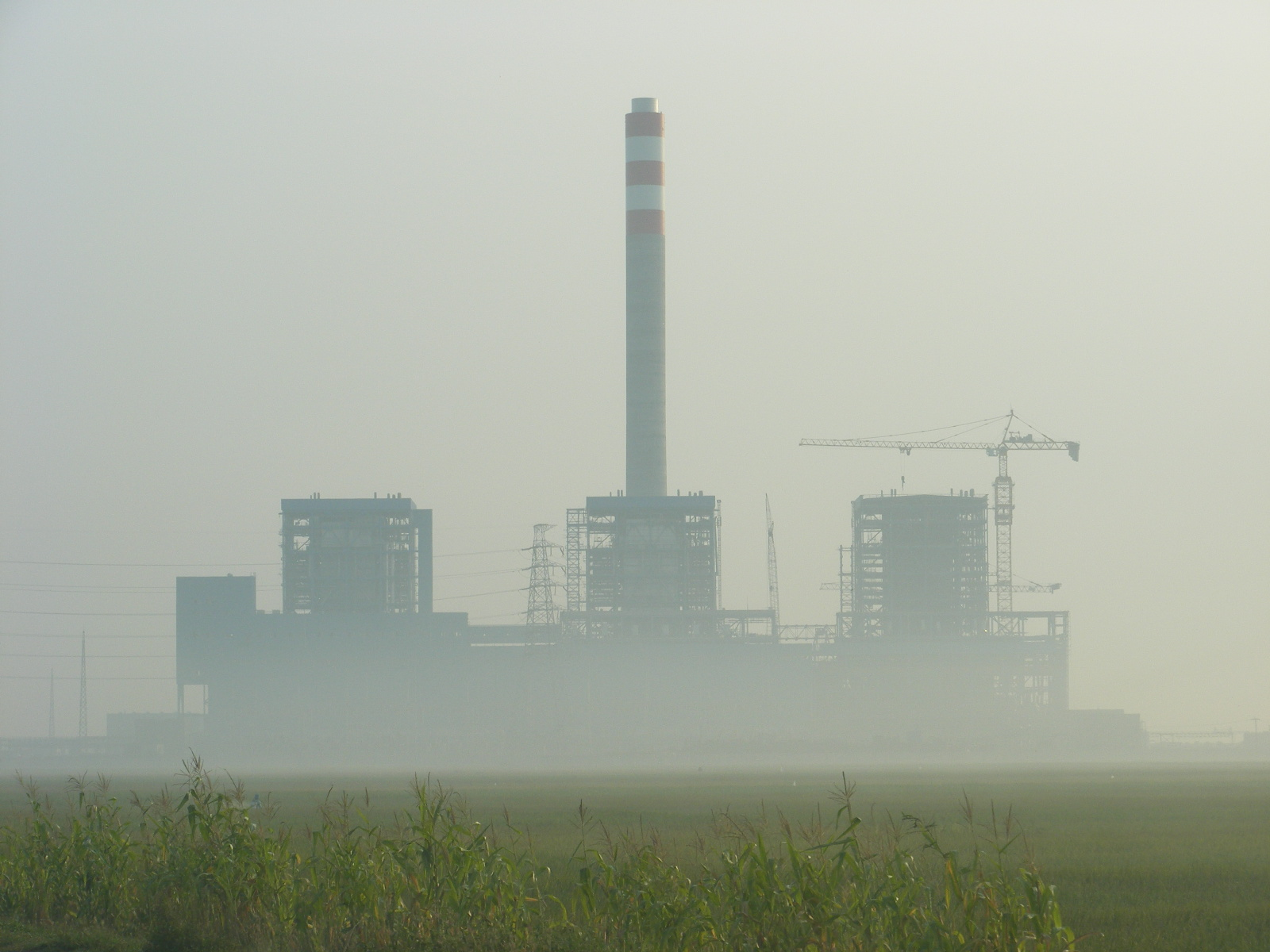 PLTU Indramayu, Indonesia